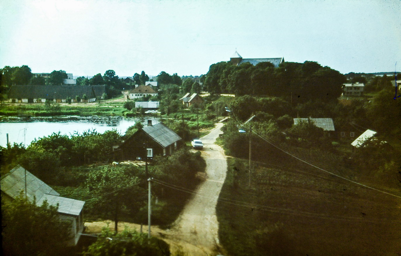 Vepriai central part in 1970s